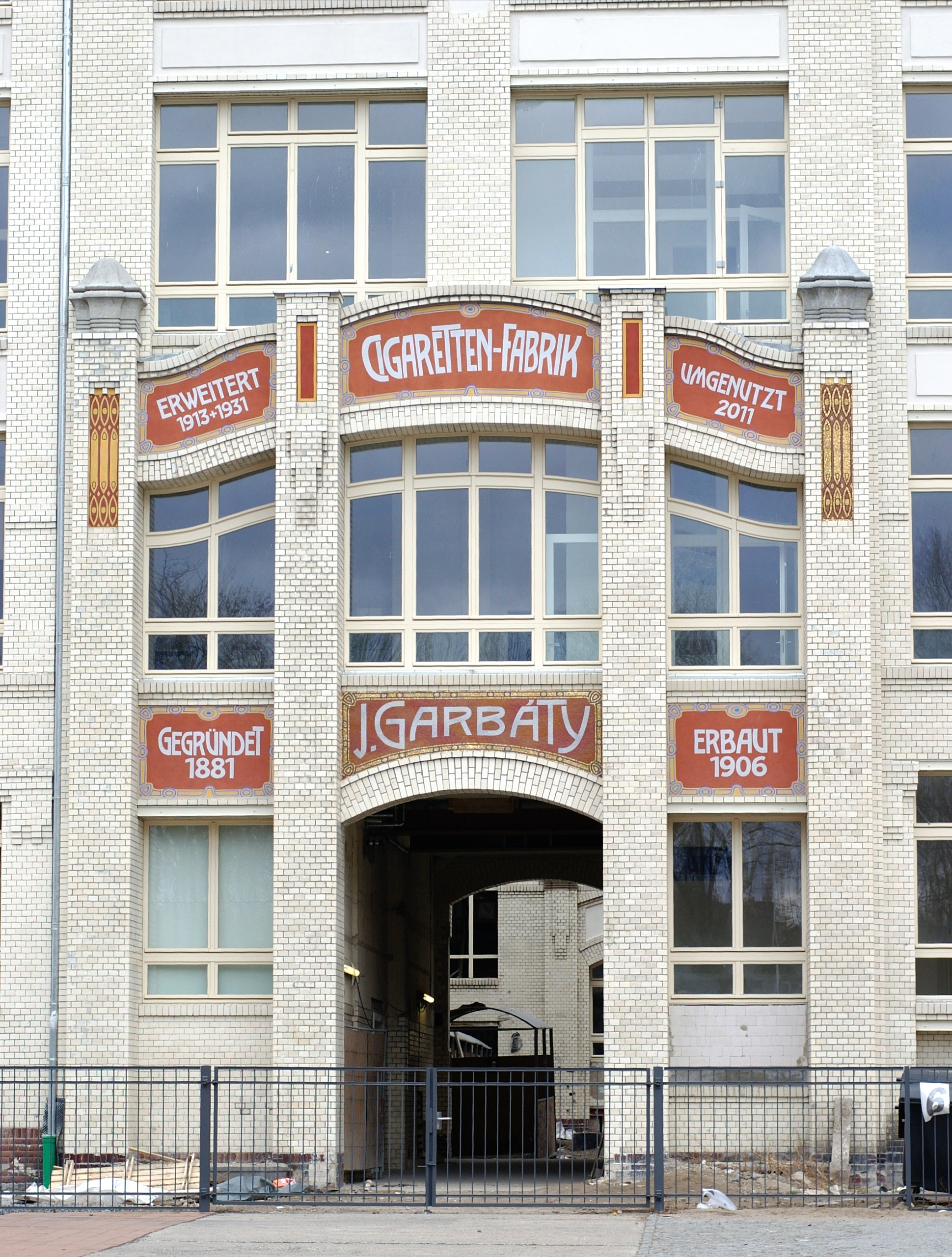 J. Garbaty Cigaretten-Fabrik, Berlin-Pankow